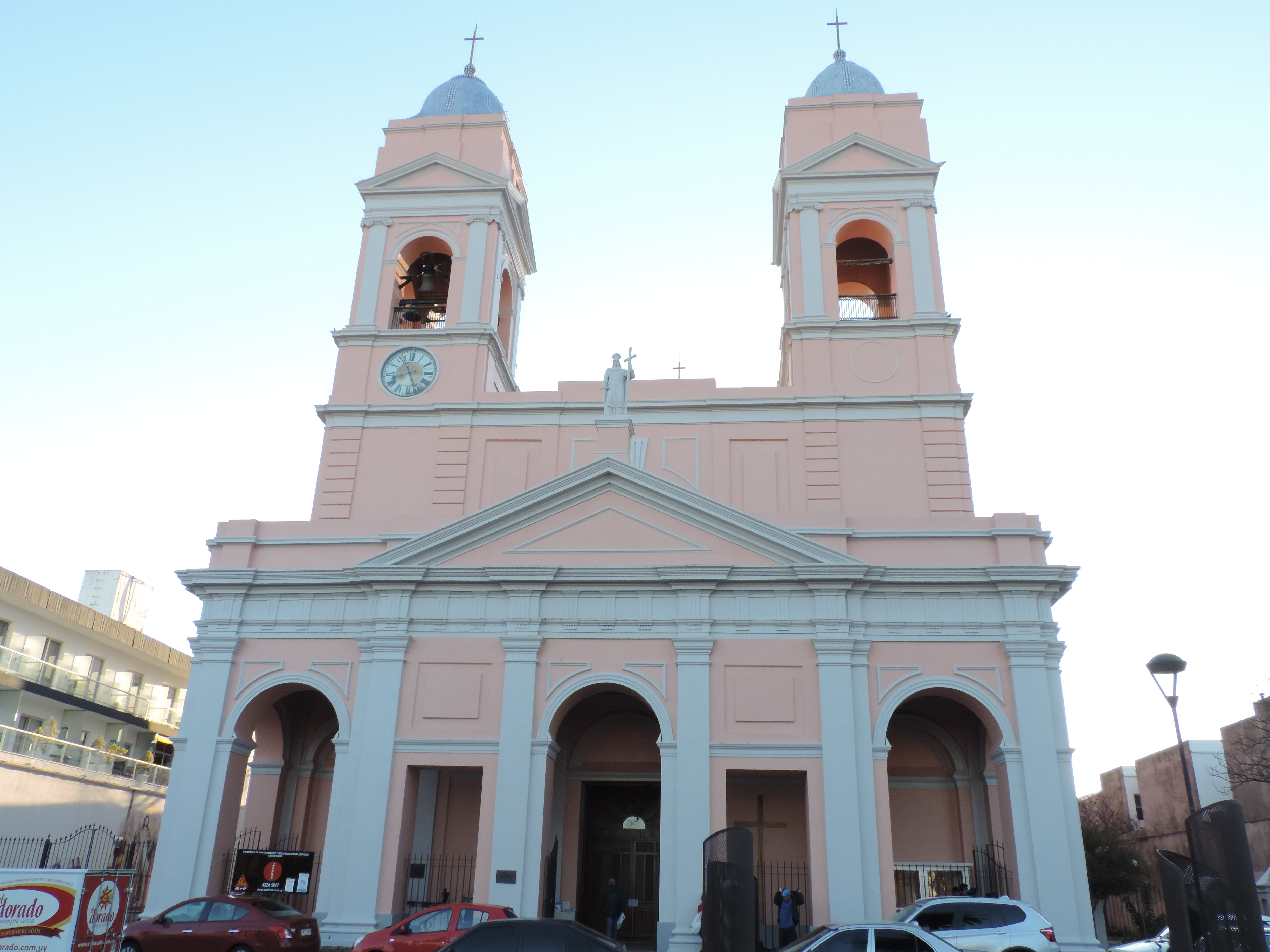 Iglesia Catedral de San Fernando de Maldonado - Cementerio anexo y entornos. Ubicada en el departamento de Maldonado